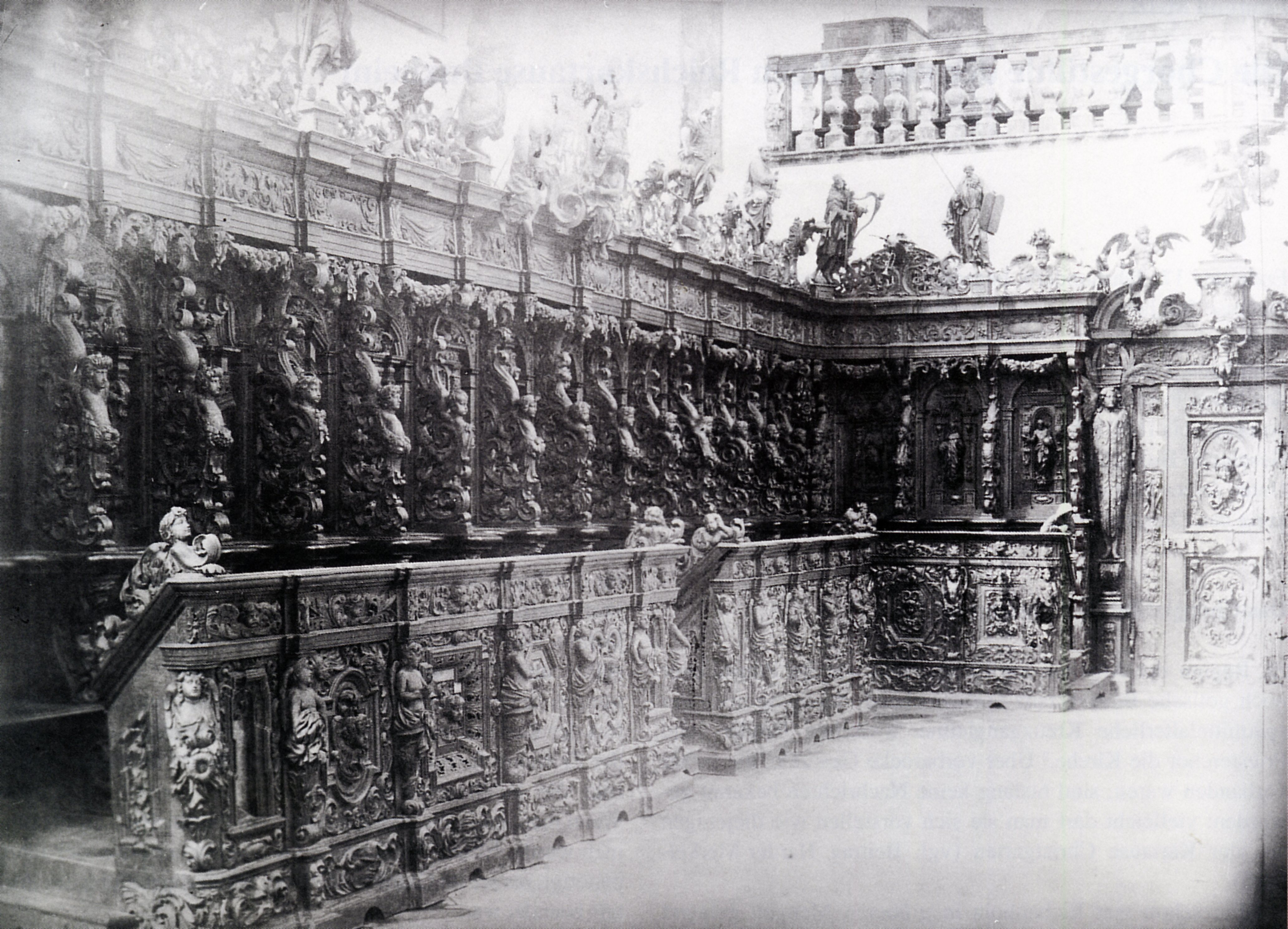 Das Buxheimer Chorgestühl der ehemaligen oberschwäbischen Reichskartause Buxheim Vor der Versteigerung, Aufnahme vermutlich aus dem Jahr 1883.